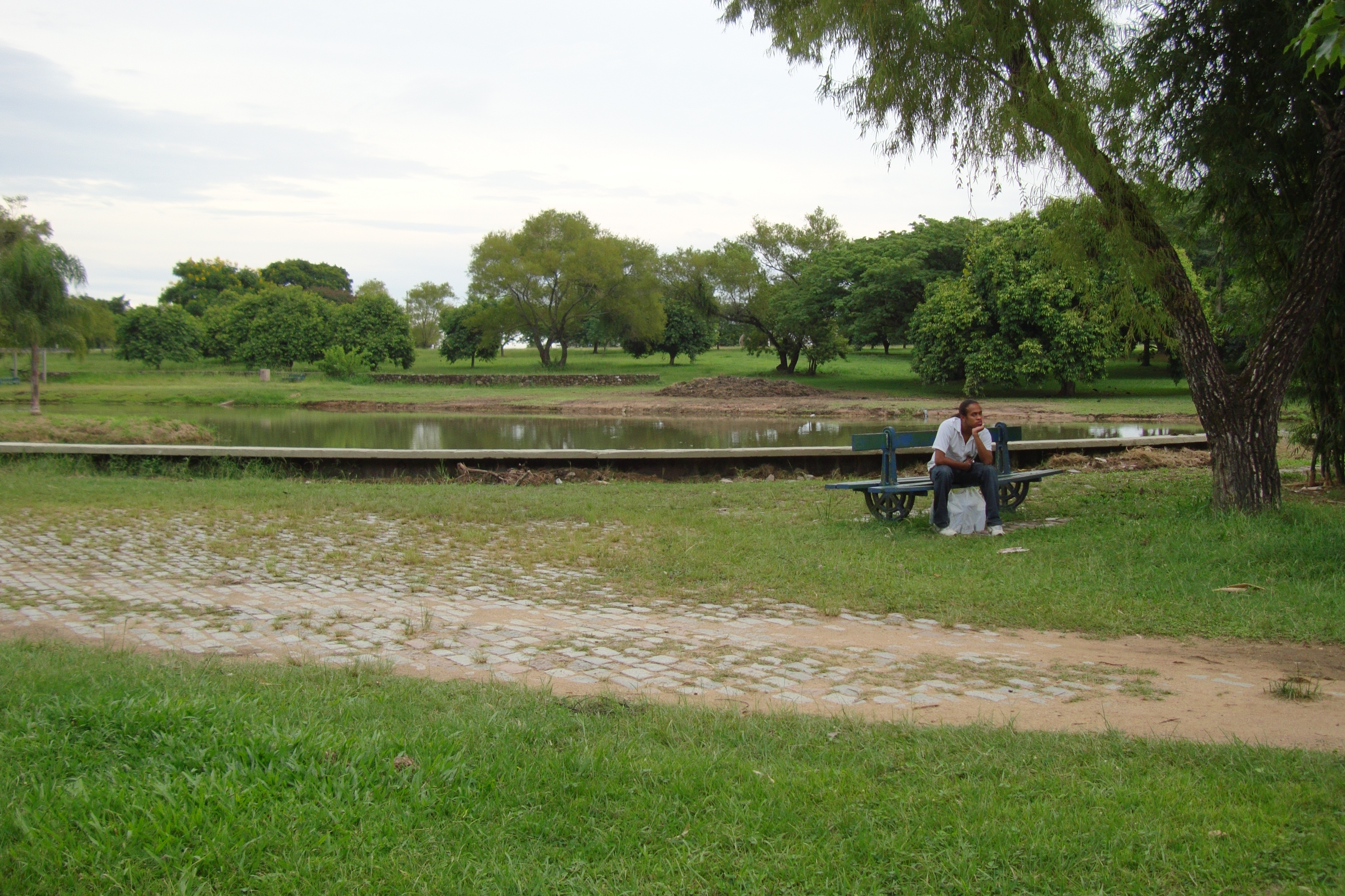 Parque Marinha do Brasil : Lago da Saudade